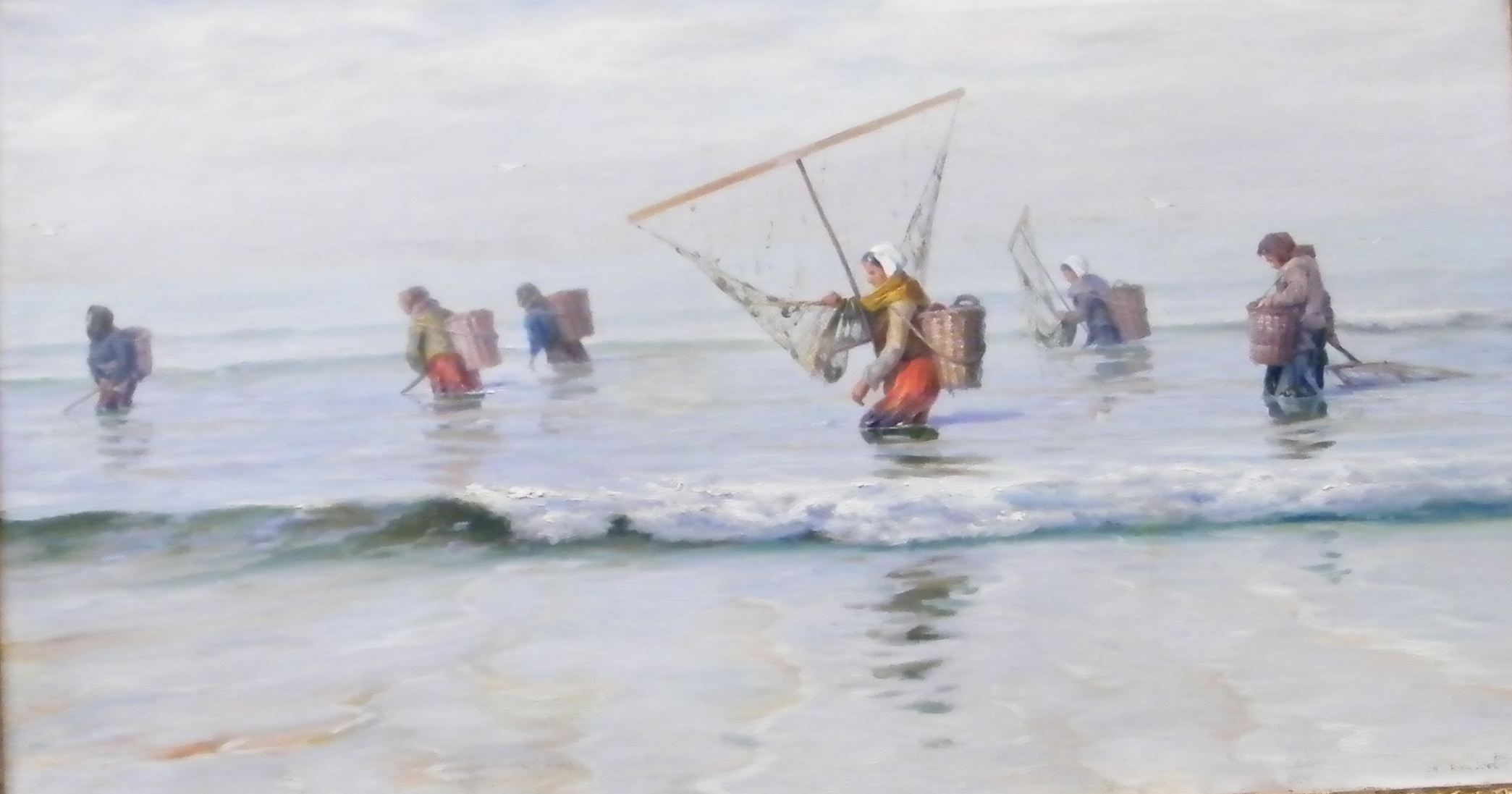 Charles Roussel-Pêcheuses de crevettes